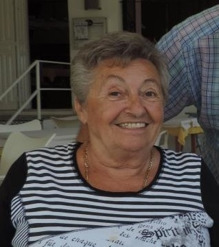 Gewezen zangeres Rita Ray geniet van haar pensioen in Spanje